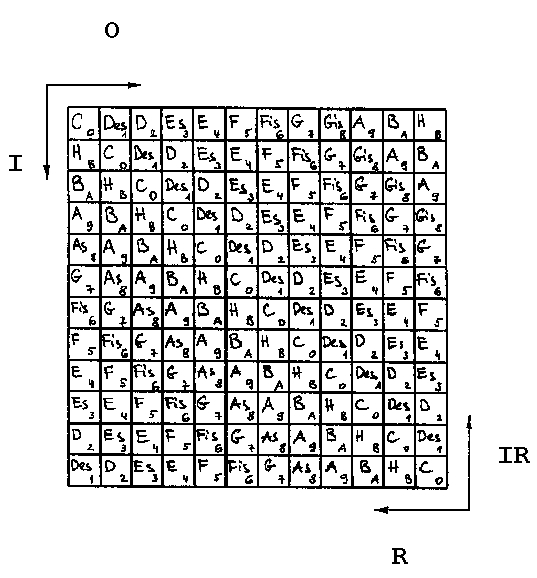 Transpositsioonide maatriks: originaal (O) koos transpositsioonidega (Tn) loetakse vasakult paremale, inversioon (I) ülevalt alla, retrograad (R) paremalt vasakule ning inversiooni retrograad (IR) alt üles (Cope 1977:16-18)